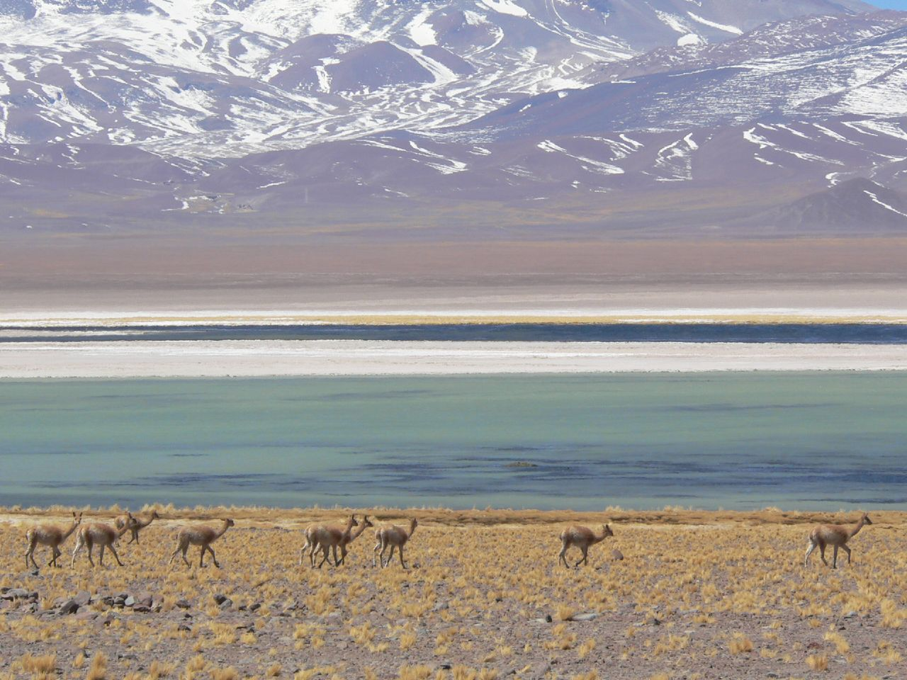 Laguna Santa Rosa, Nevado Tres Cruces National Park, Chile.